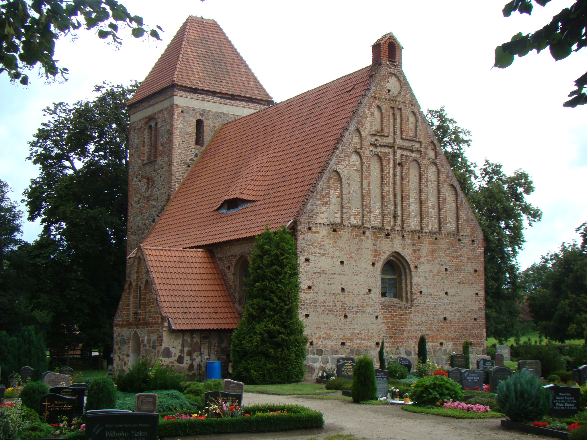 Dorfkirche in Sommerstorf (Grabowhöfe). Foto: Peter Schmelzle 2011